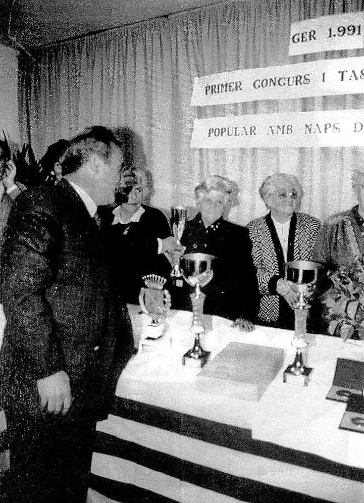 I Festa del Nap , 1991 , Entrega de premis a les mastreses de casa